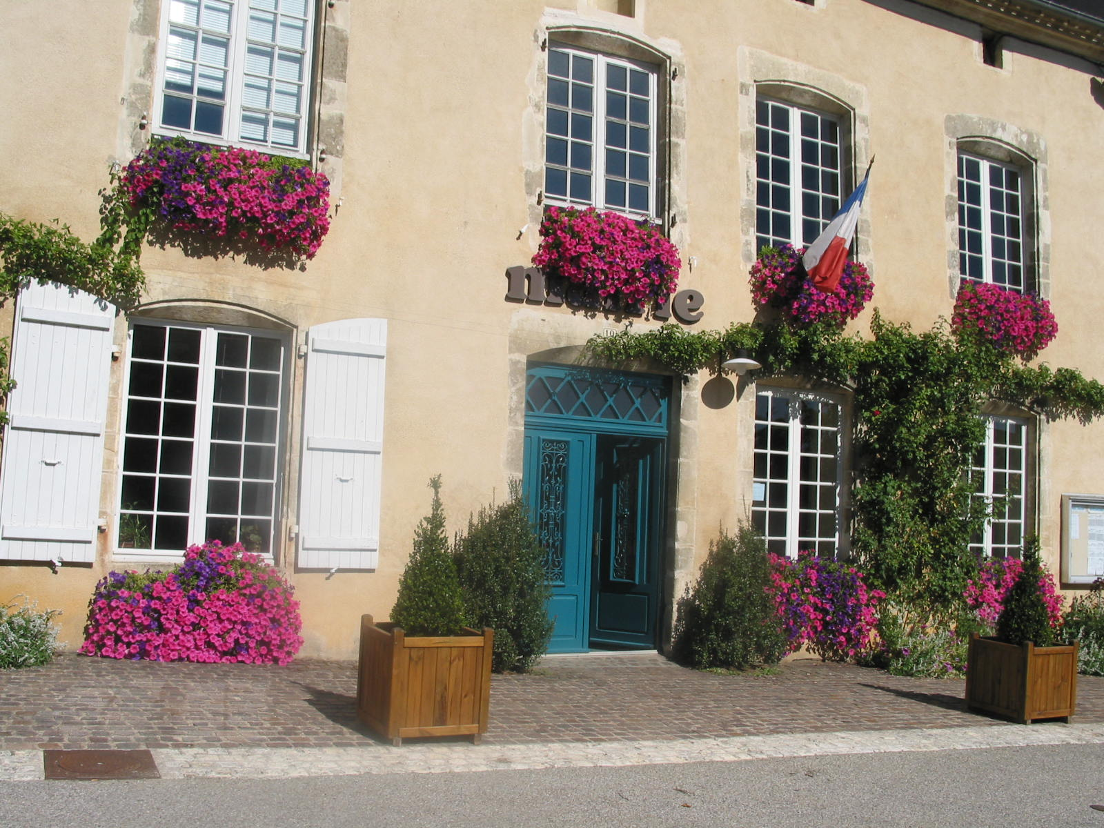 La mairie face à l'église.